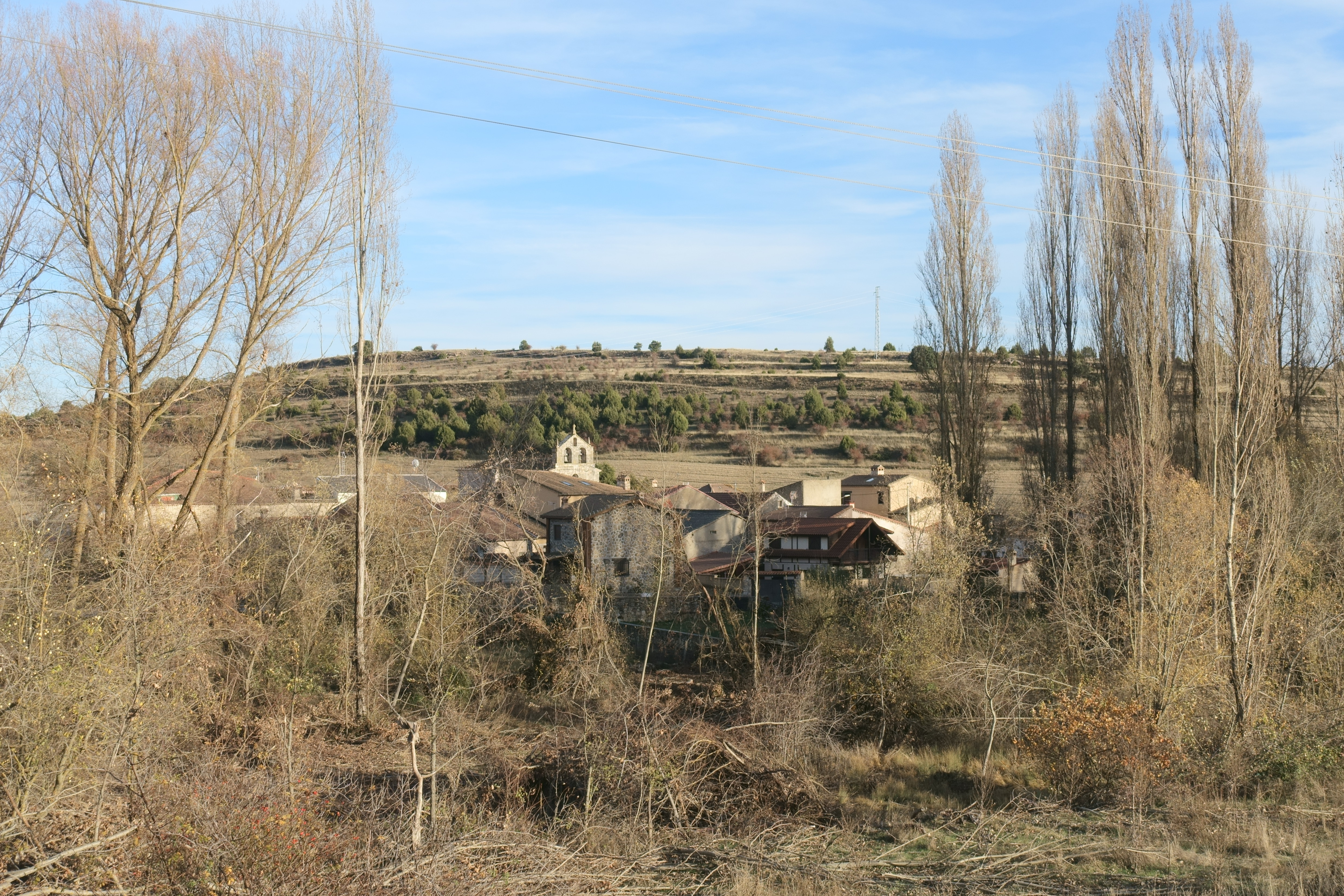 Vista general de Carabias (Segovia, España).